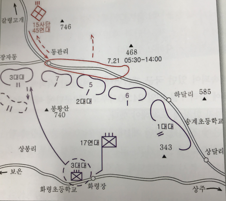 동관리전투상황도이다.